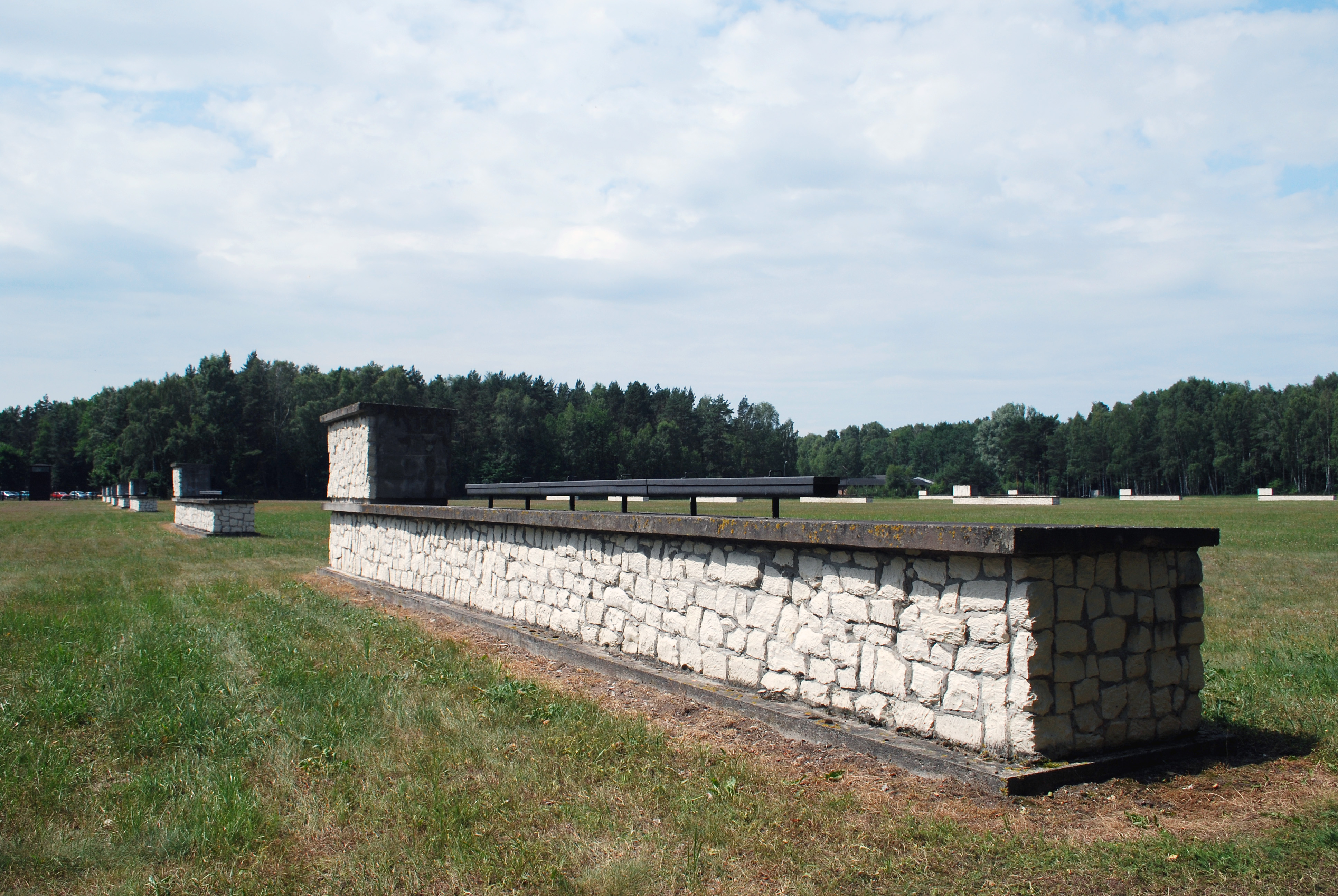 Pozostałości nowego podobozu w obozie KL Stutthof.